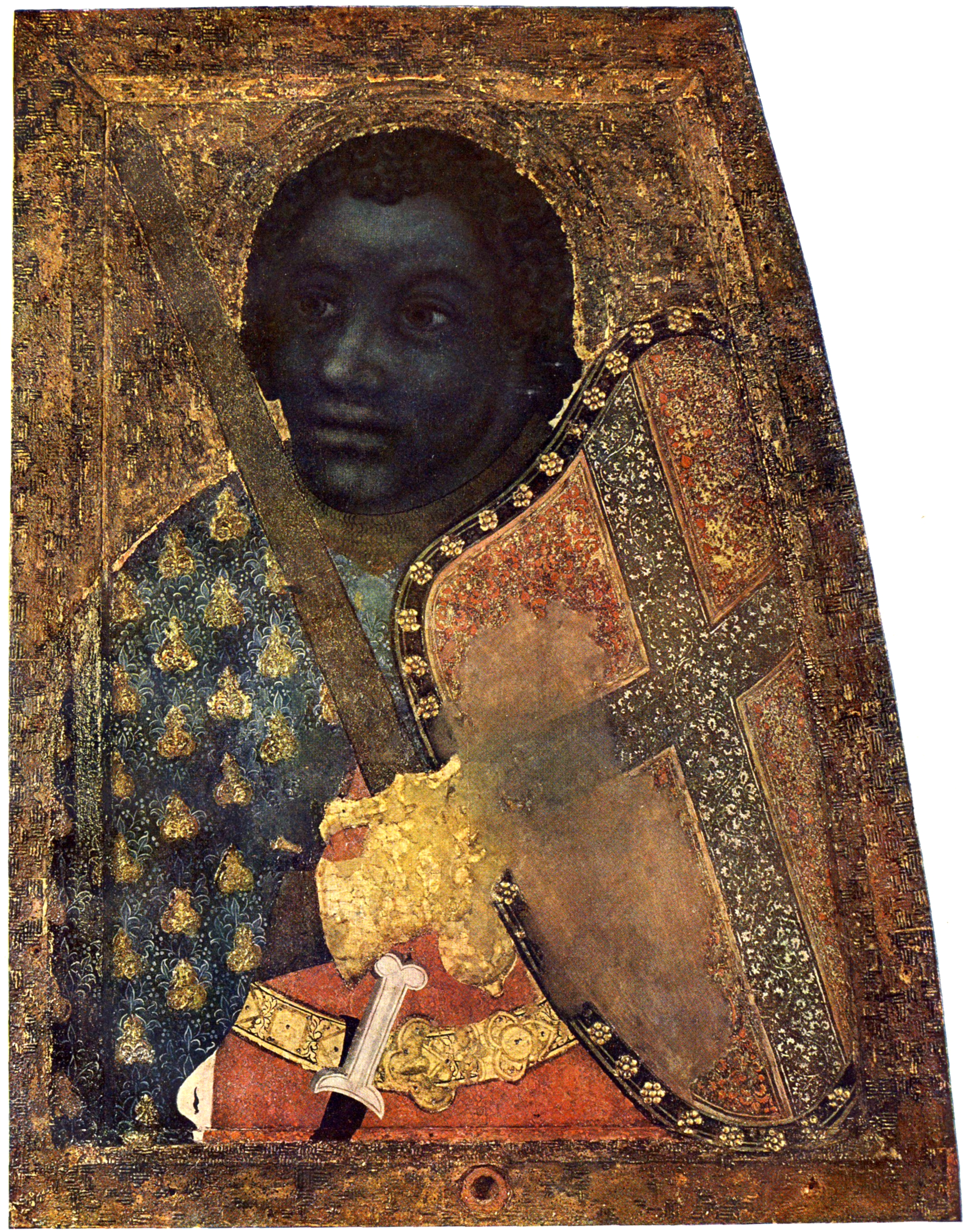 Saint Maurice